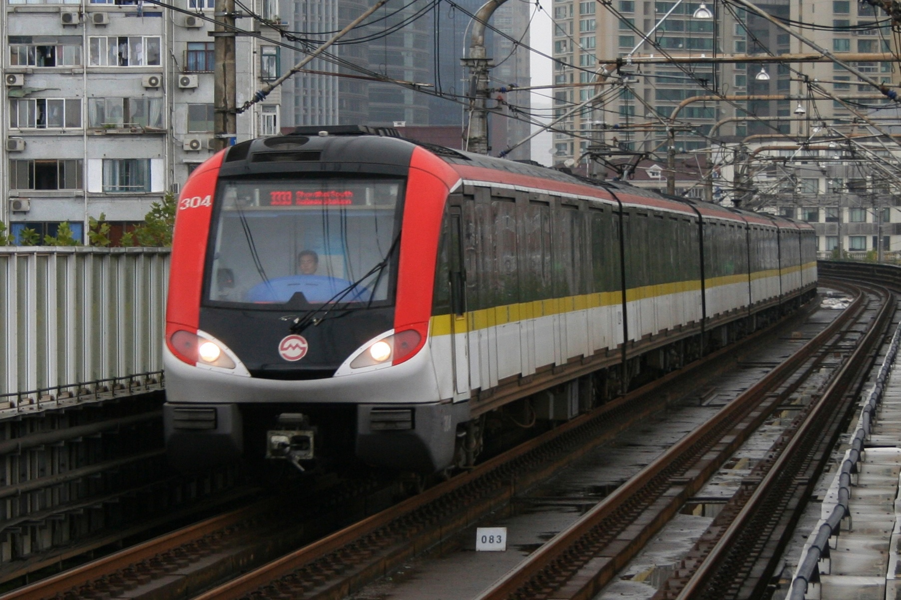 Shanghai Metro Line 3 AC03